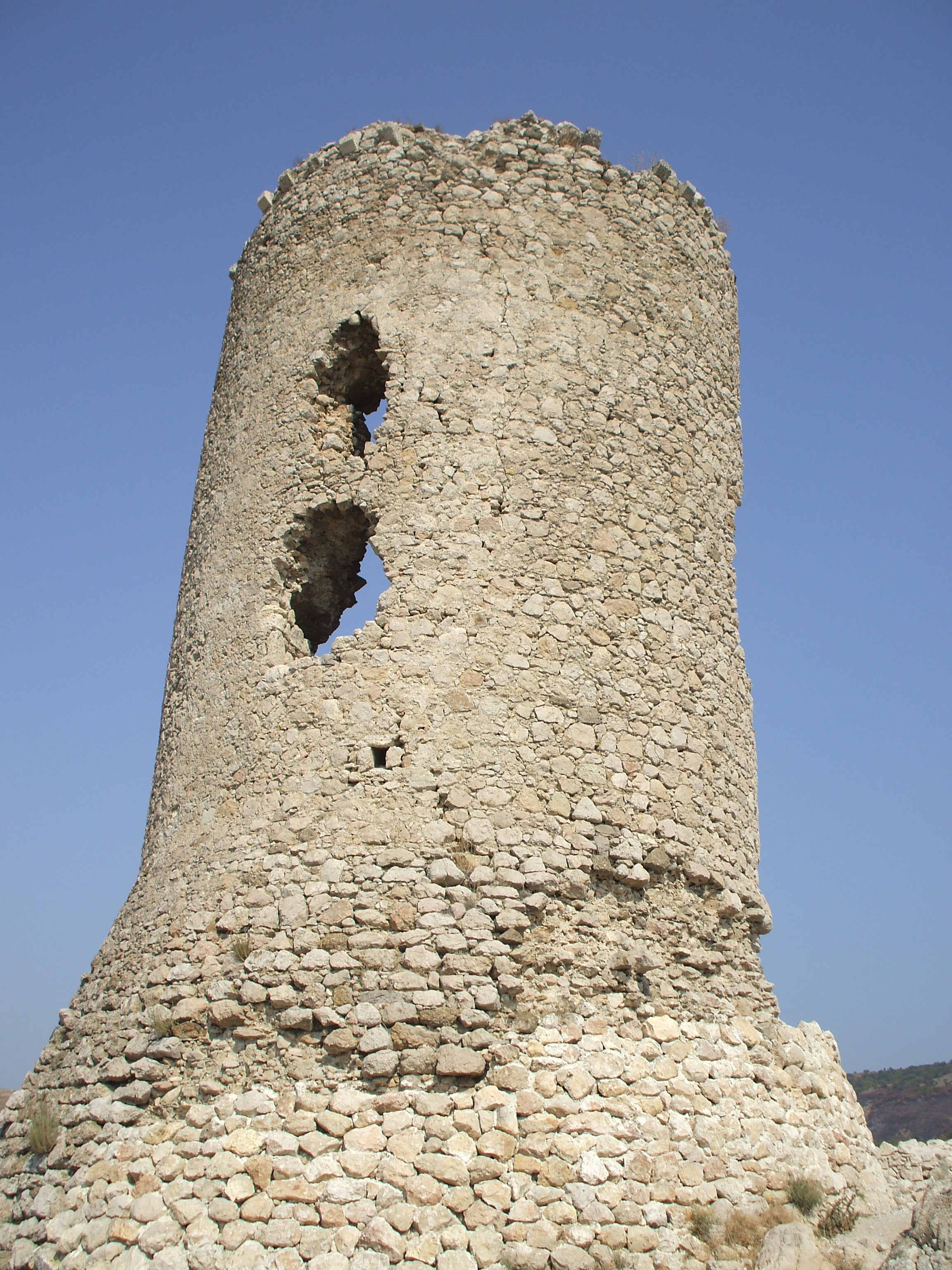 Балаклава или Чемболо, главная башня